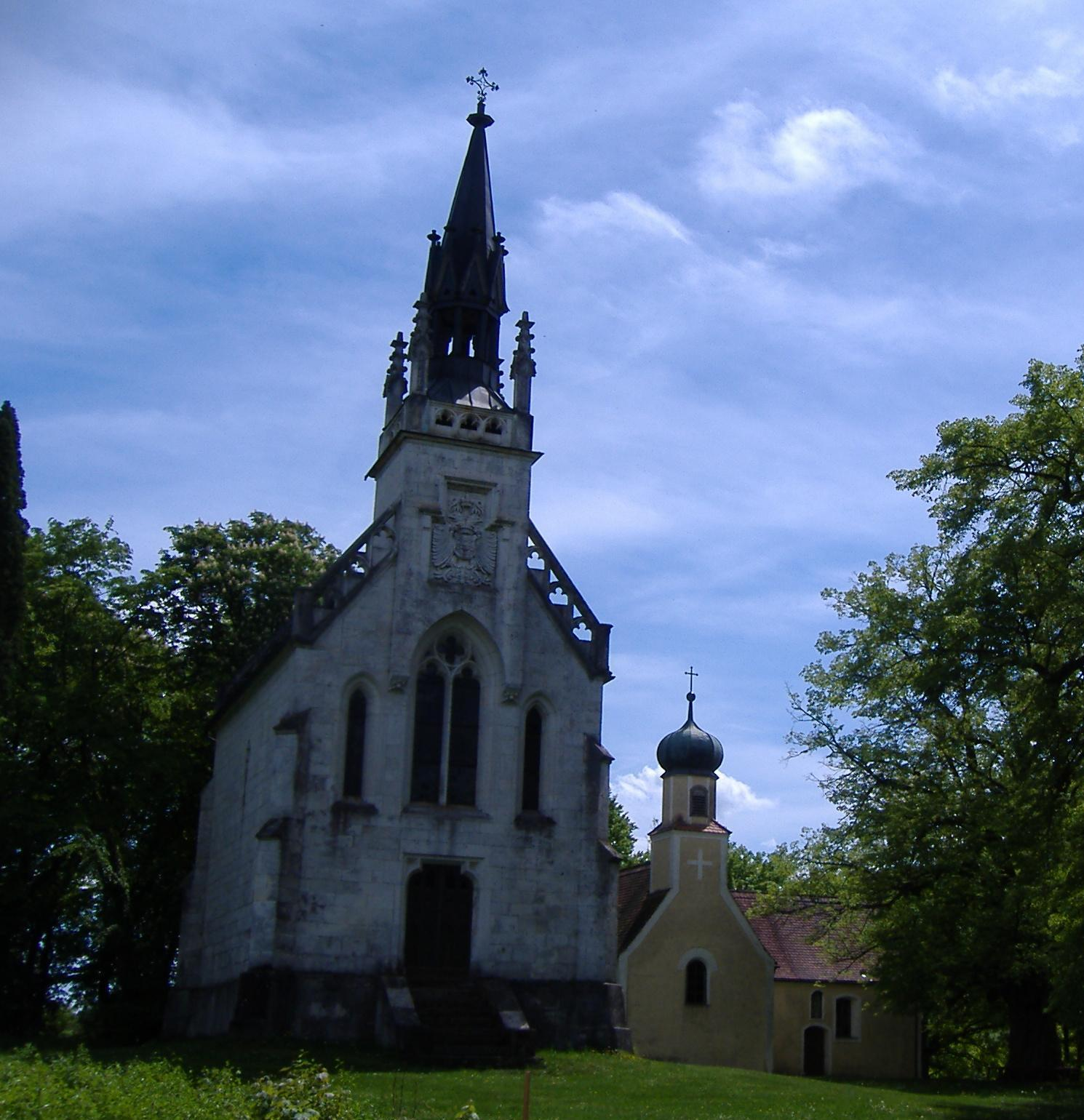 Kapellen auf dem Antonienberg bei Stepperg